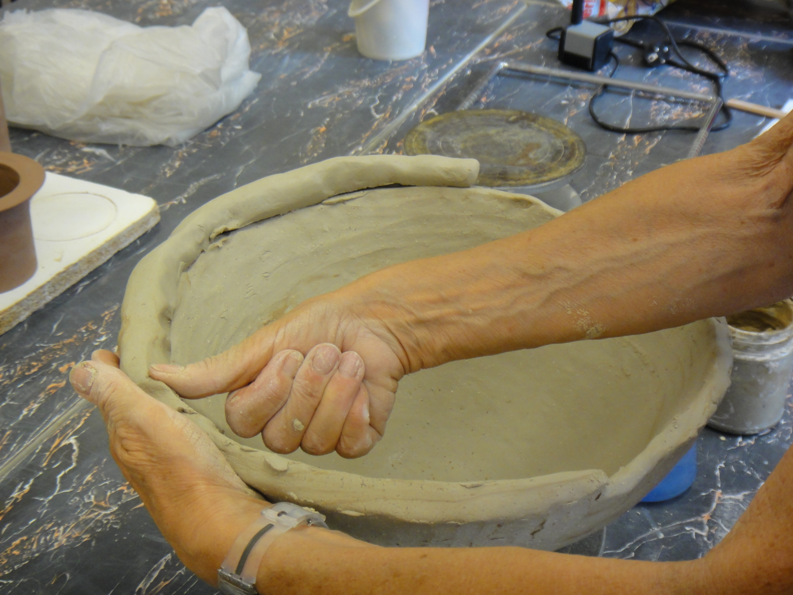 Herstellung einer Schale aus Steinzeugmasse, grob schamottiert, in Wulsttechnik, Verstreichen des aufgesetzten Wulstes mit dem inneren oberen Rand des Werkstücks